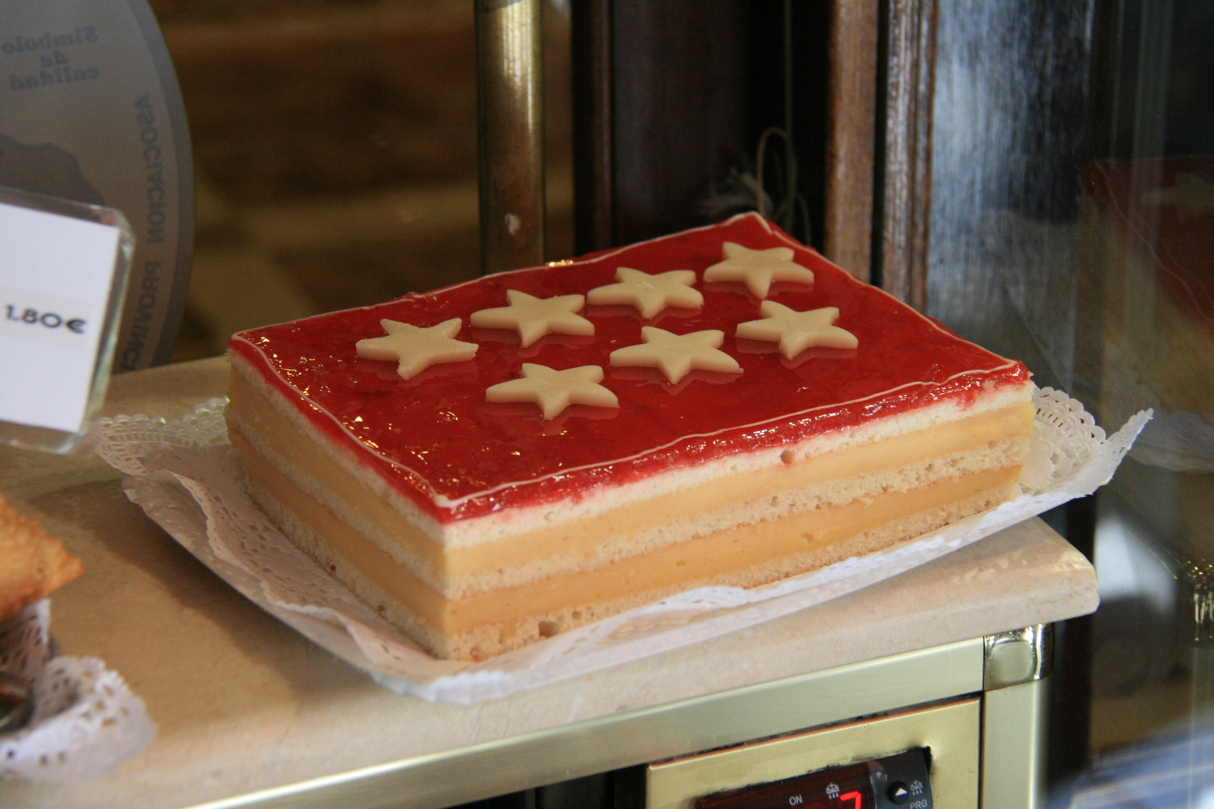 Tarta de la comunidad de Madrid